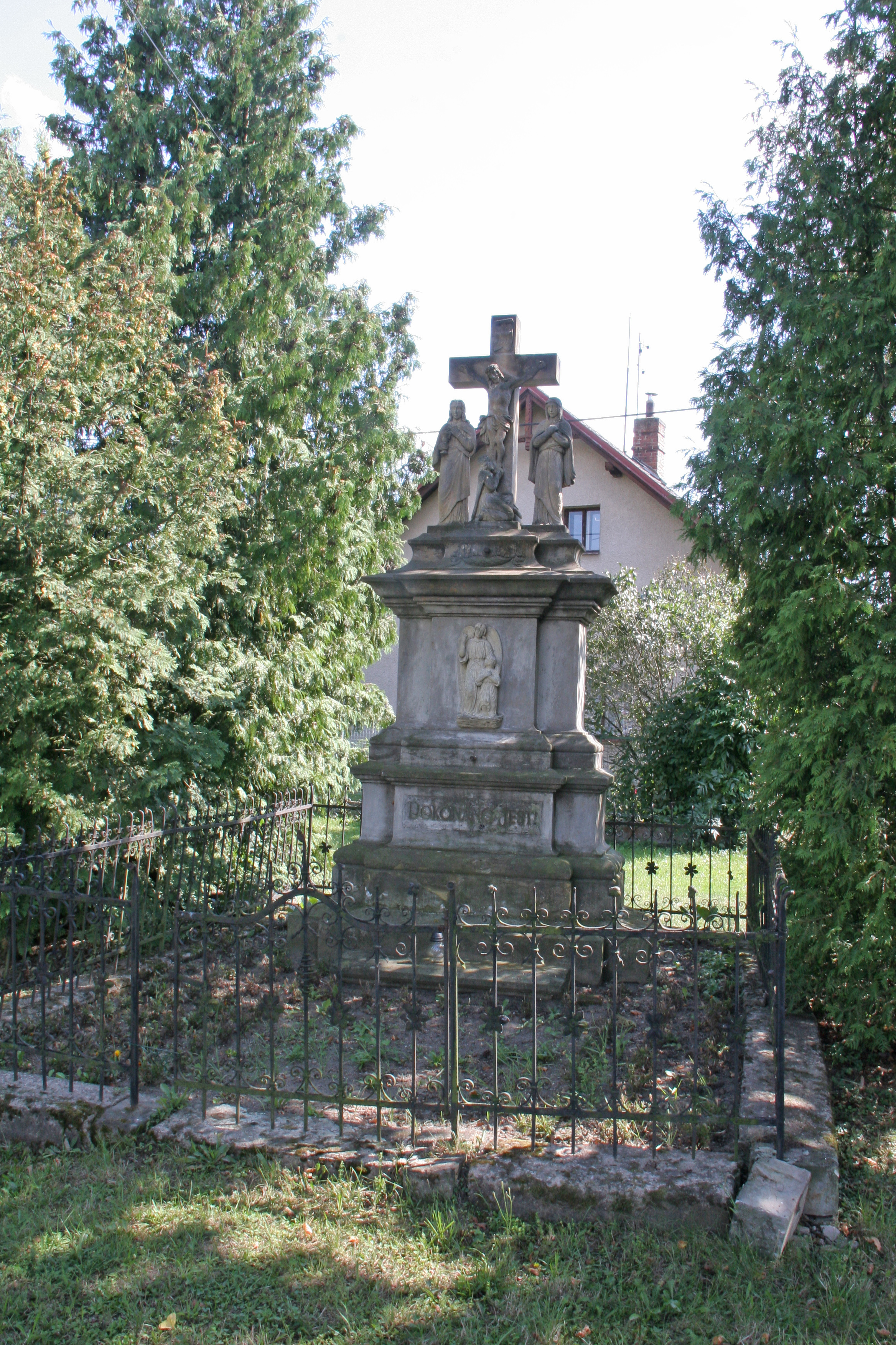 Slatina kříž